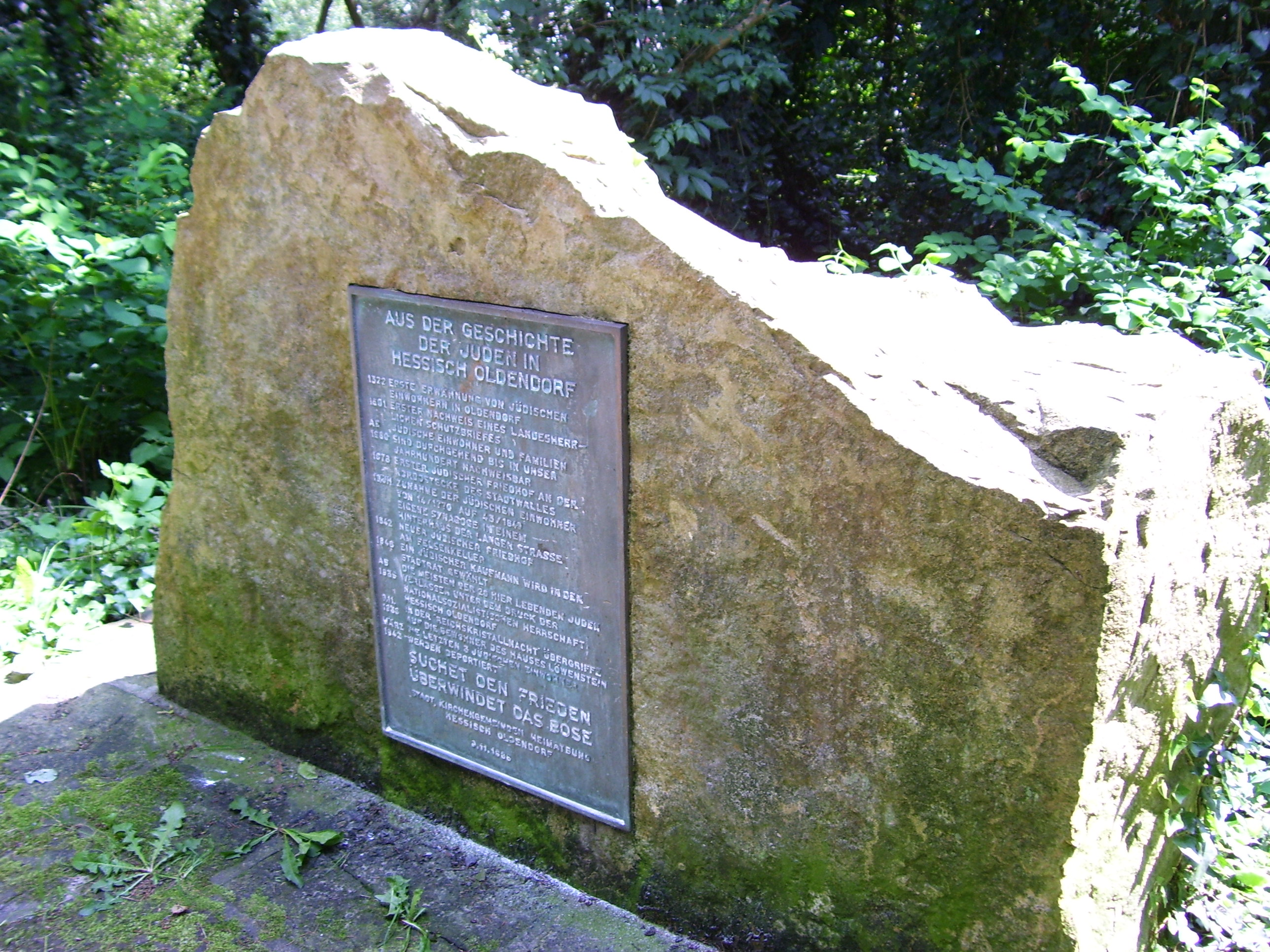 Juden-Gedenkstein auf dem Nordost-Stadtwall